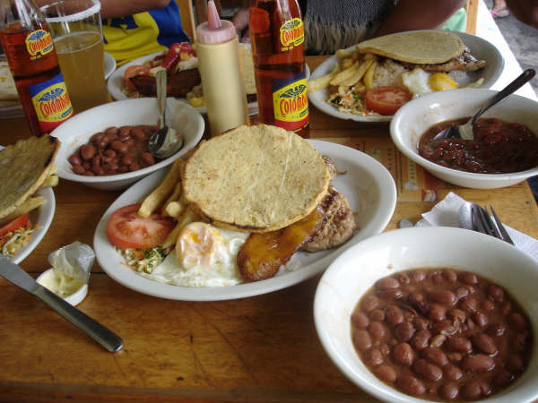 Bandeja Paisa